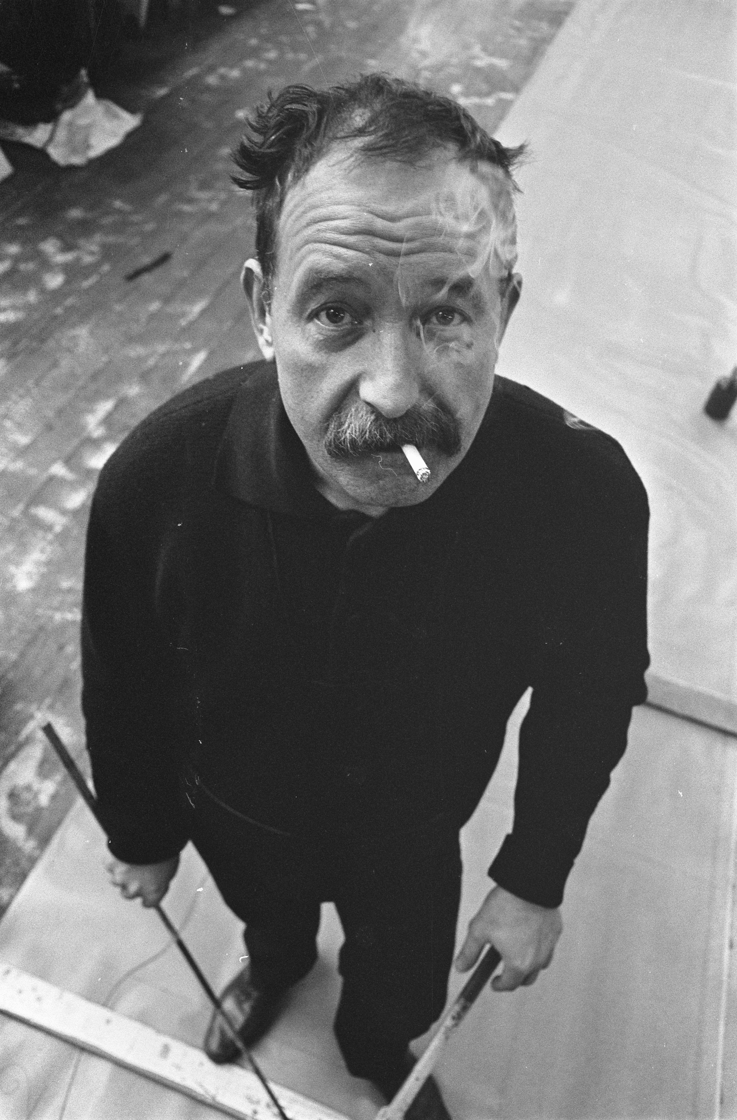 Collectie / Archief : Fotocollectie Anefo Reportage / Serie : [ onbekend ] Beschrijving : Opdracht Limburgs Dagblad, Nicolaas Wijnberg , kunstenaar Datum : 20 februari 1968 Trefwoorden : kunstenaars Fotograaf : Kroon, Ron / Anefo Auteursrechthebbende : Nationaal Archief Materiaalsoort : Negatief (zwart/wit) Nummer archiefinventaris : bekijk toegang 2.24.01.05 Bestanddeelnummer : 921-0996